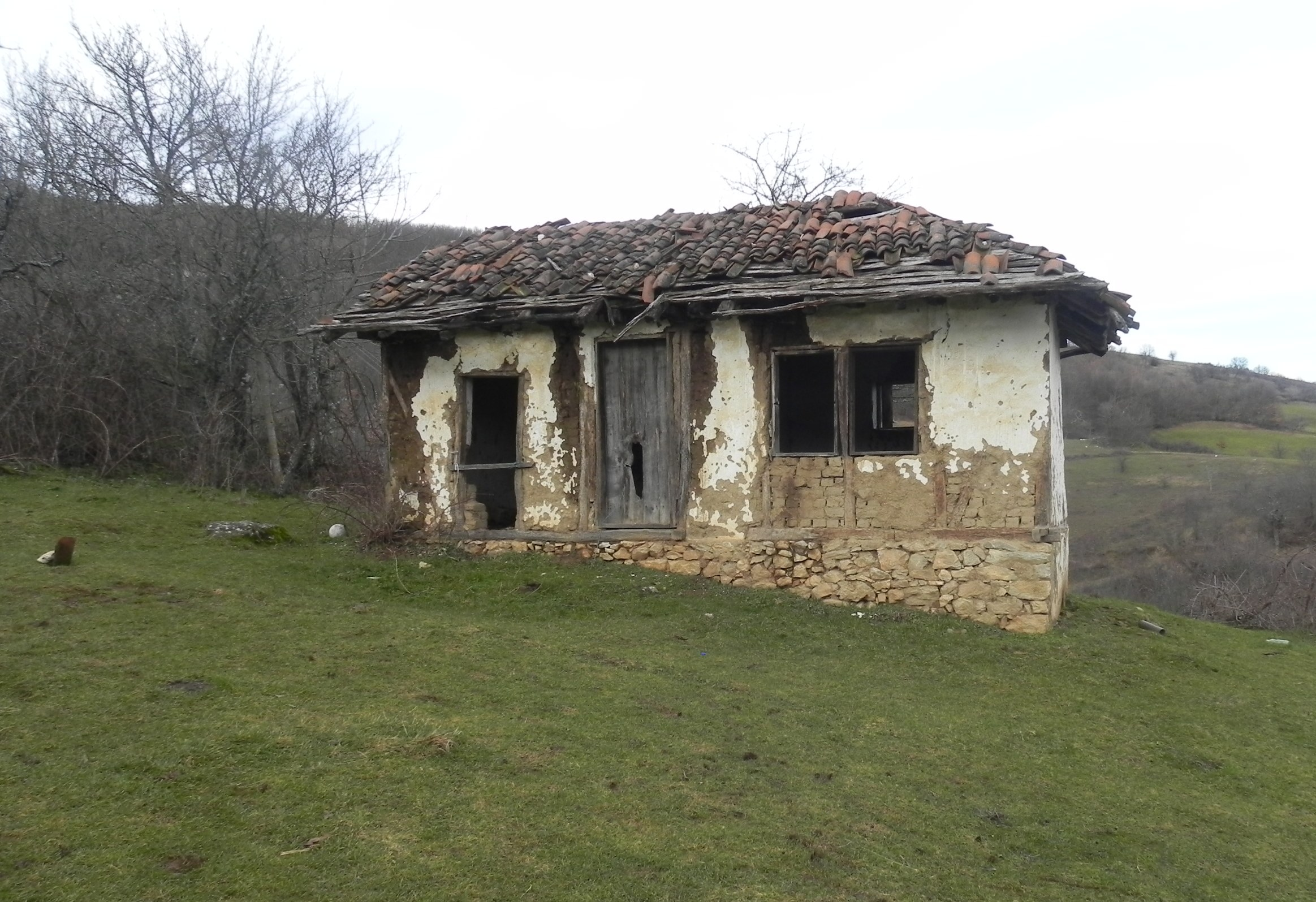 The house of Ajet Koka